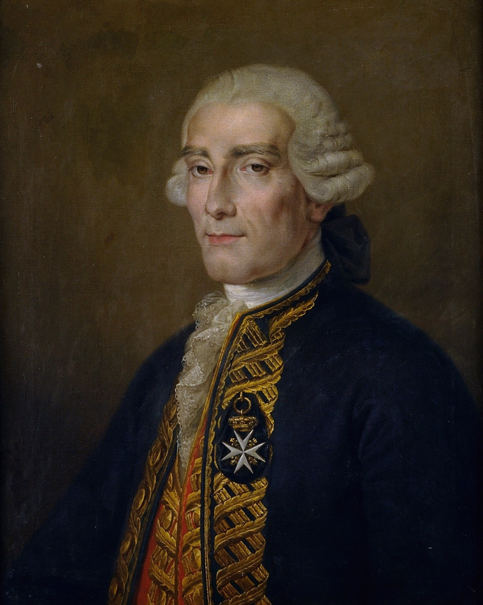 Retrato del marino español Jorge Juan y Santacilia (1713-1773), que también fue caballero de la Orden de Malta.